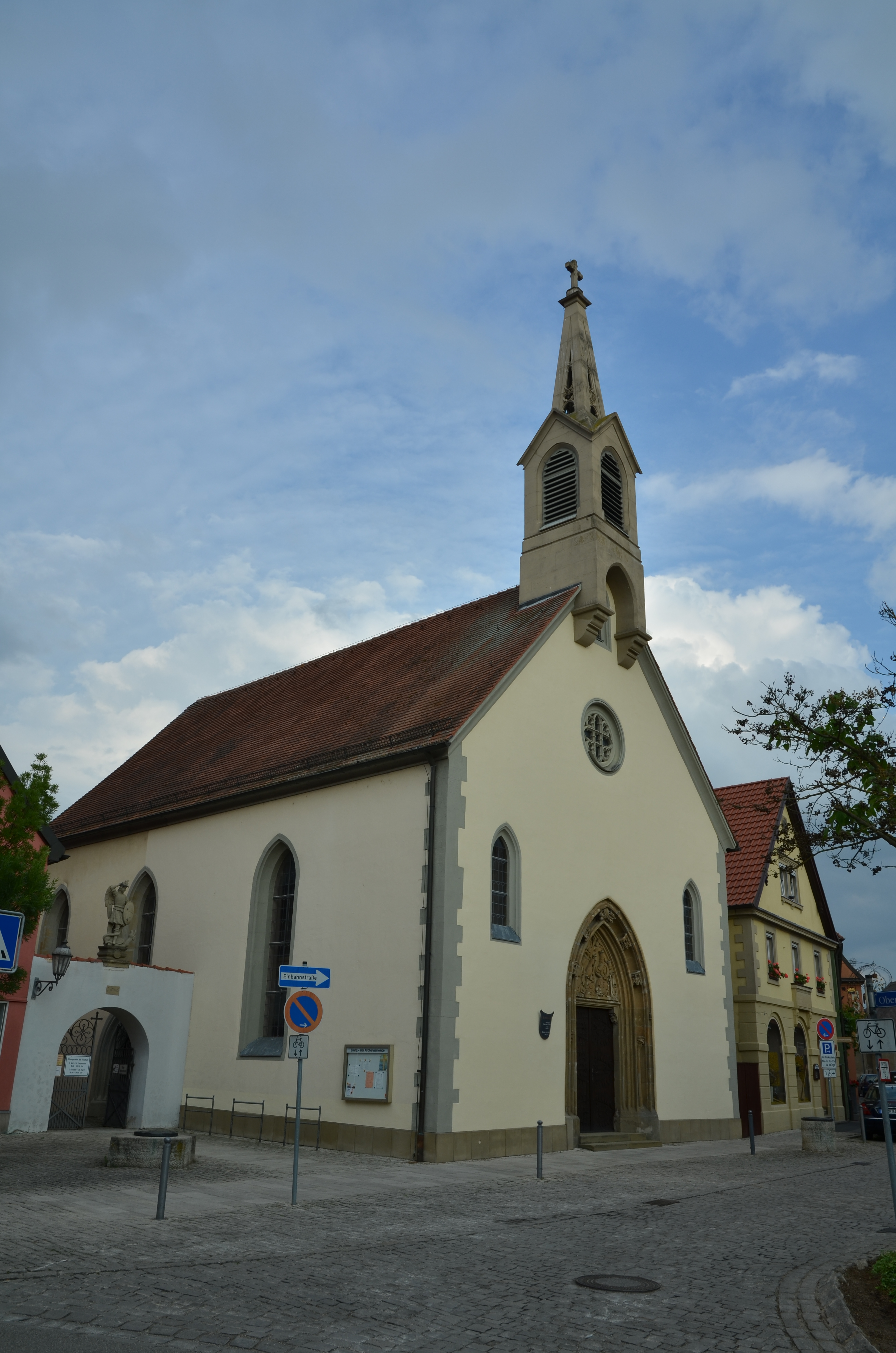 evang.-luth. Kapelle St. Michael in Volkach am Oberen Markt